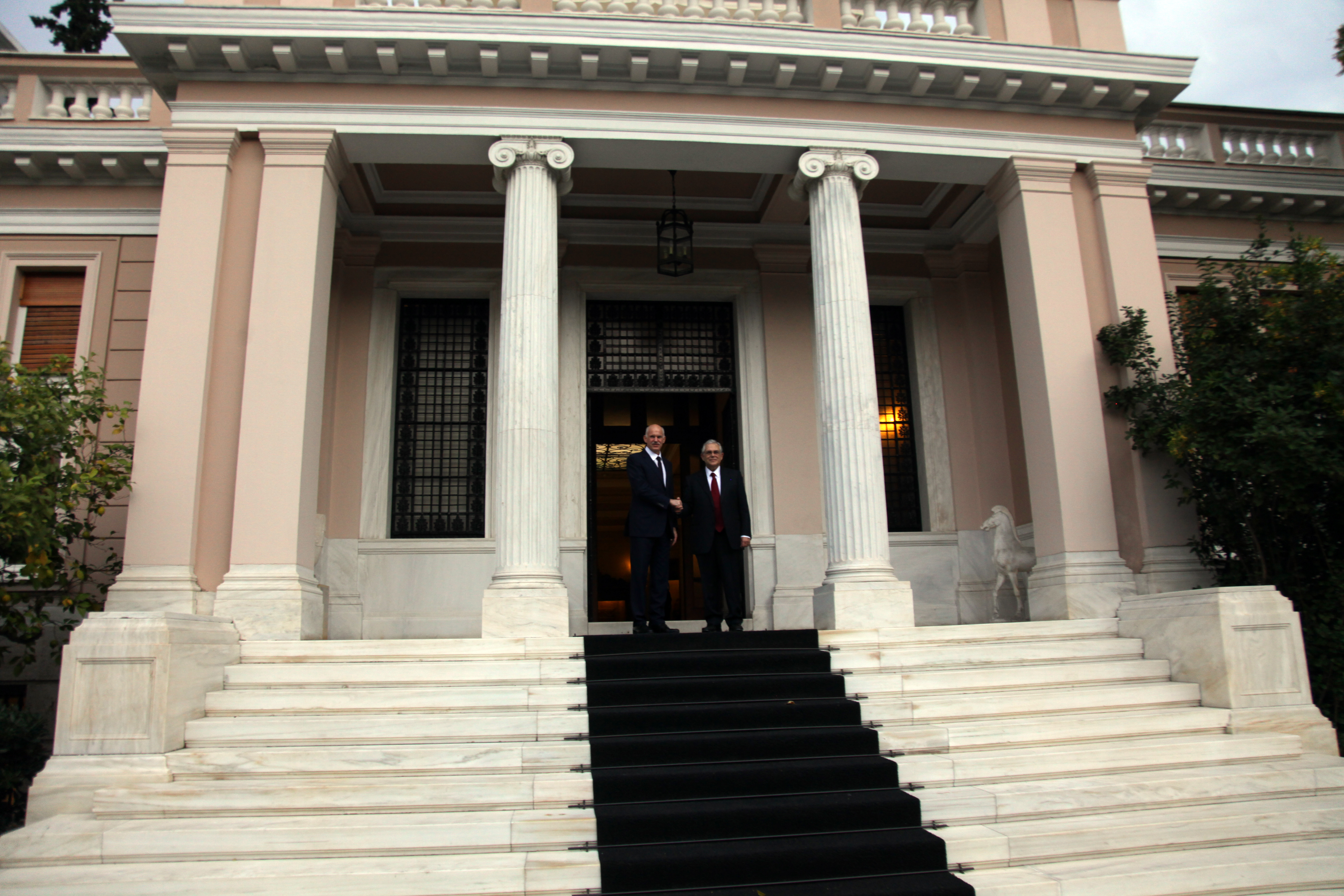 Τελετή παράδοσης-παραλαβής στο Μέγαρο Μαξίμου Μέγαρο Μαξίμου 11 Νοεμβρίου, 2011